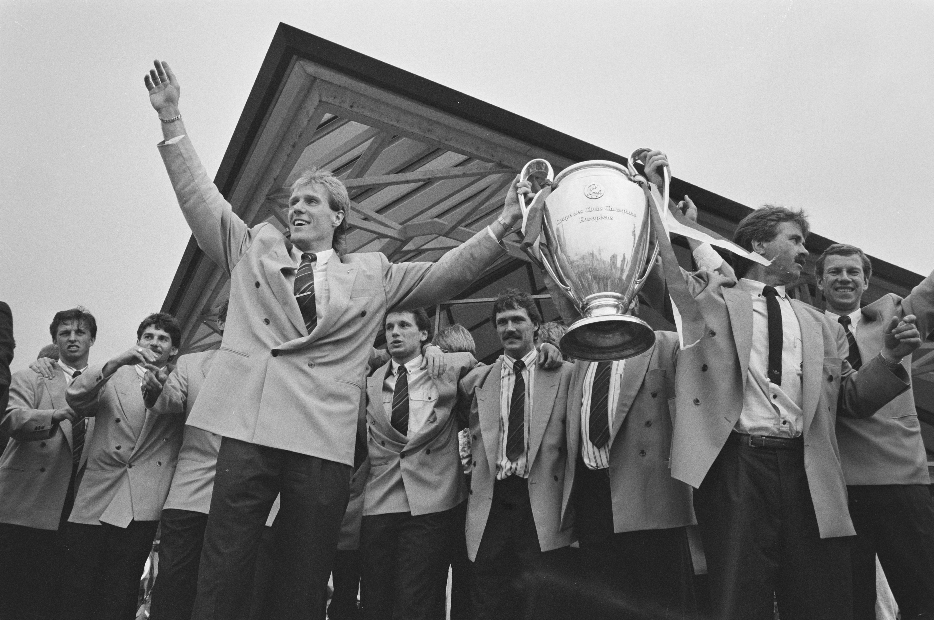 Collectie / Archief : Fotocollectie Anefo Reportage / Serie : [ onbekend ] Beschrijving : Aankomst PSV met Europa Cup I op vliegveld Eindhoven; Hans van Breukelen en trainer Guus Hiddink met de beker Datum : 26 mei 1988 Locatie : Eindhoven Trefwoorden : bekers, sport, vliegvelden, voetbal Persoonsnaam : Guus Hiddink, Hans Van Breukelen Instellingsnaam : PSV Fotograaf : Bogaerts, Rob / Anefo Auteursrechthebbende : Nationaal Archief Materiaalsoort : Negatief (zwart/wit) Nummer archiefinventaris : bekijk toegang 2.24.01.05 Bestanddeelnummer : 934-2544